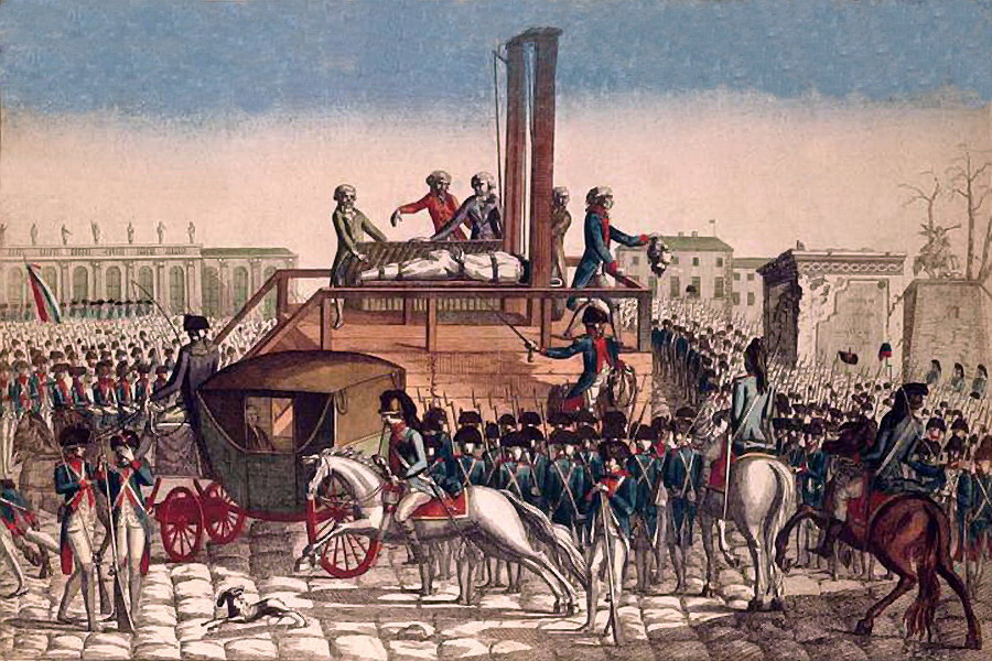 Gravure illustrant la décapitation de Louis XVI